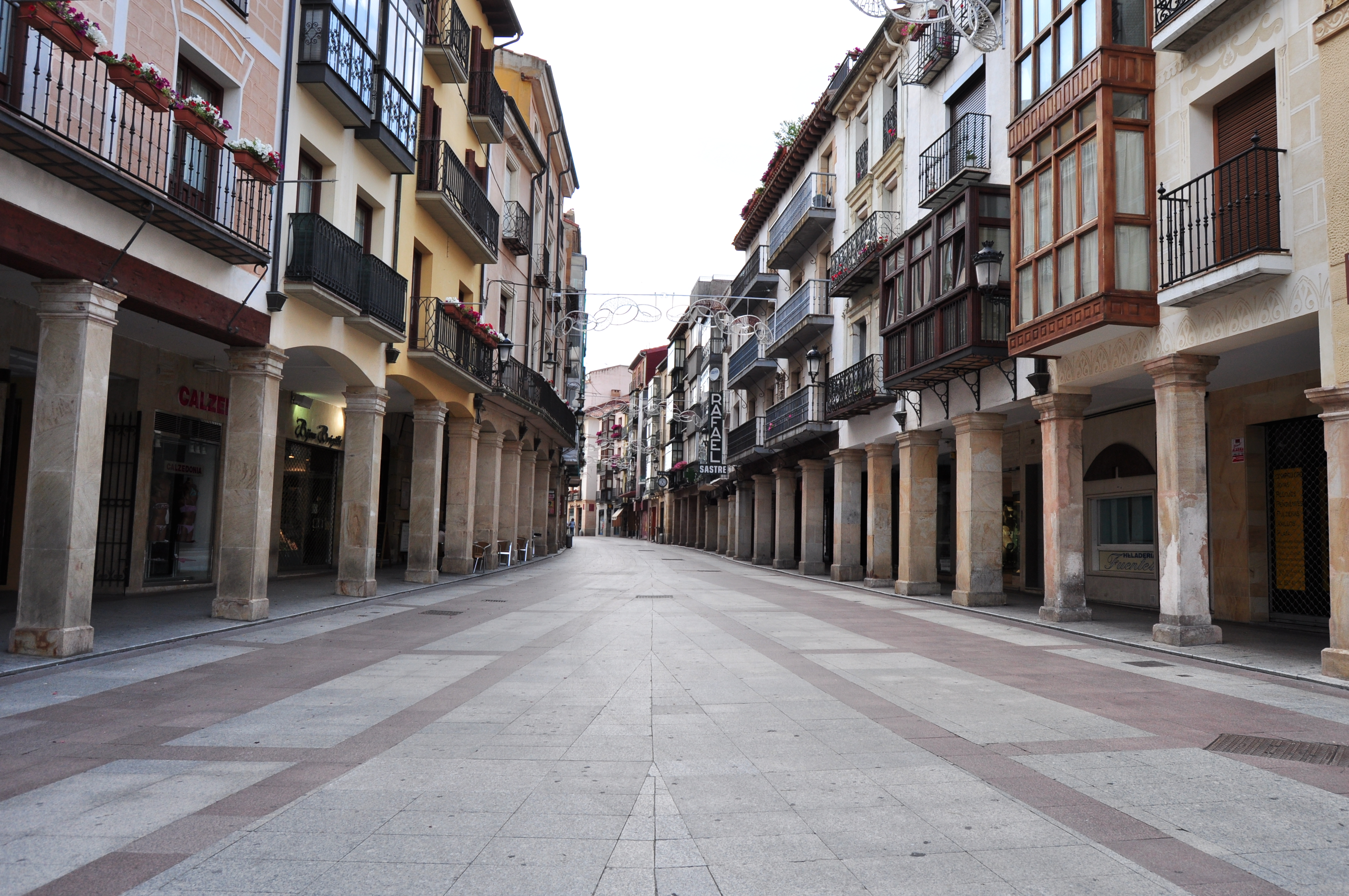 Soria Capital - 159